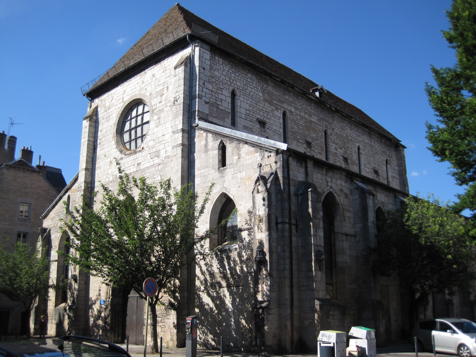 Abbaye Saint-Paul de Besançon